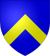 Blason Héraldique Chevron d'or sur fond d'azur Source:Wiki-MG**** @@@-fr Accueil Accueil 08:53, 18 November 2006 (UTC) Licence:GFDL